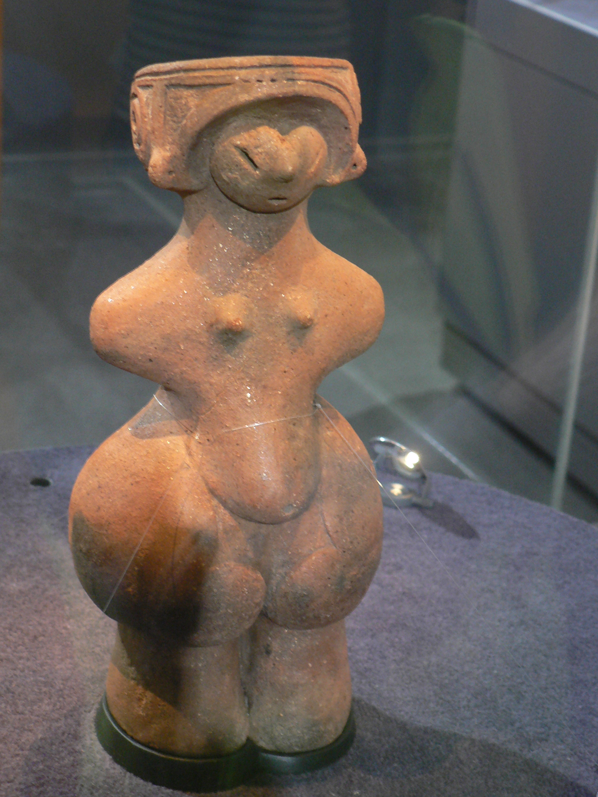 縄文のビーナスと呼ばれる長野県棚畑遺跡出土の土偶、国宝。茅野市尖石縄文考古館にて。